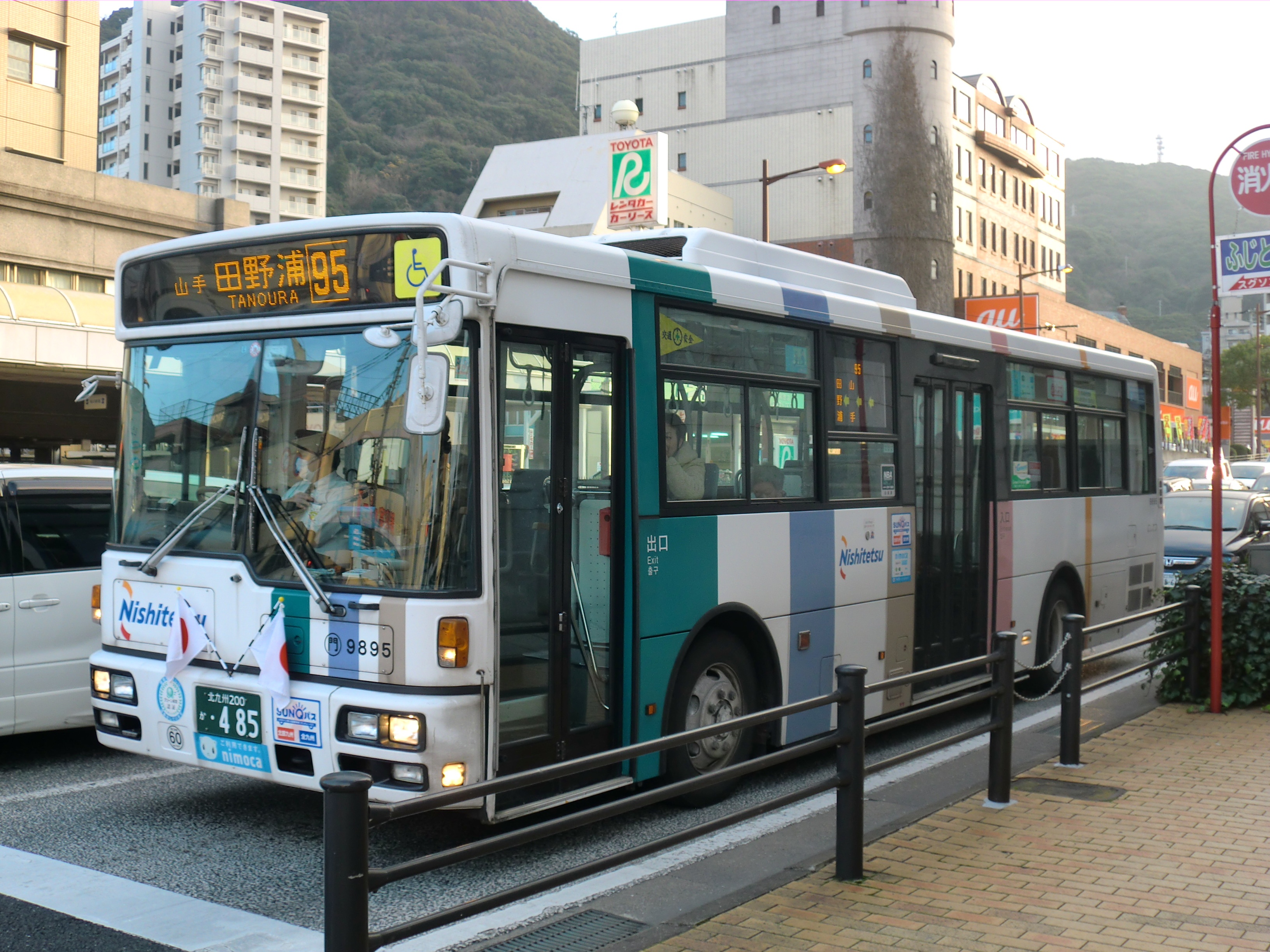 西鉄バス（北九州市で撮影）